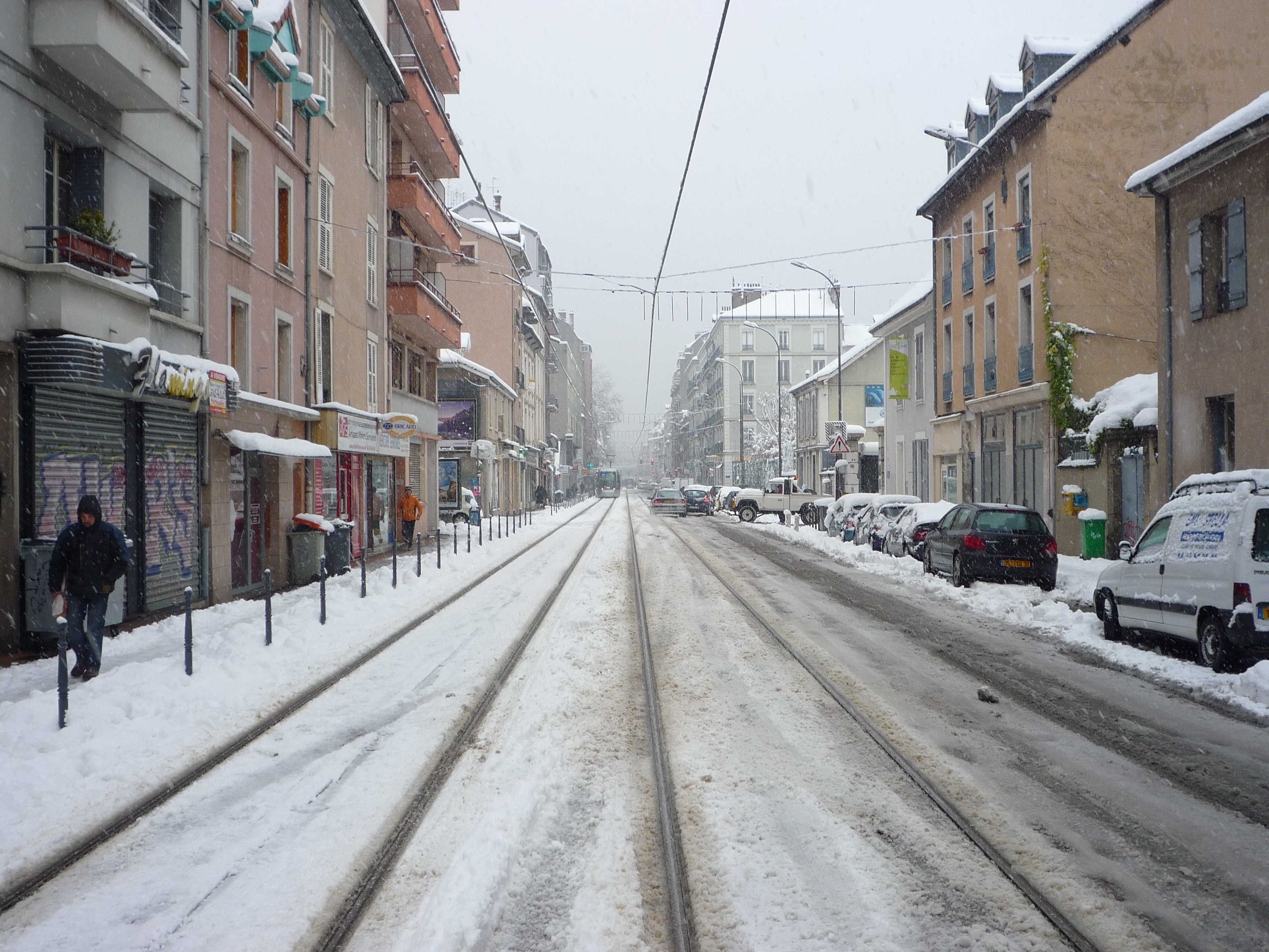 Cours Berriat à Grenoble en décembre 2010.